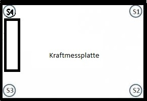 Kraftmessplatte